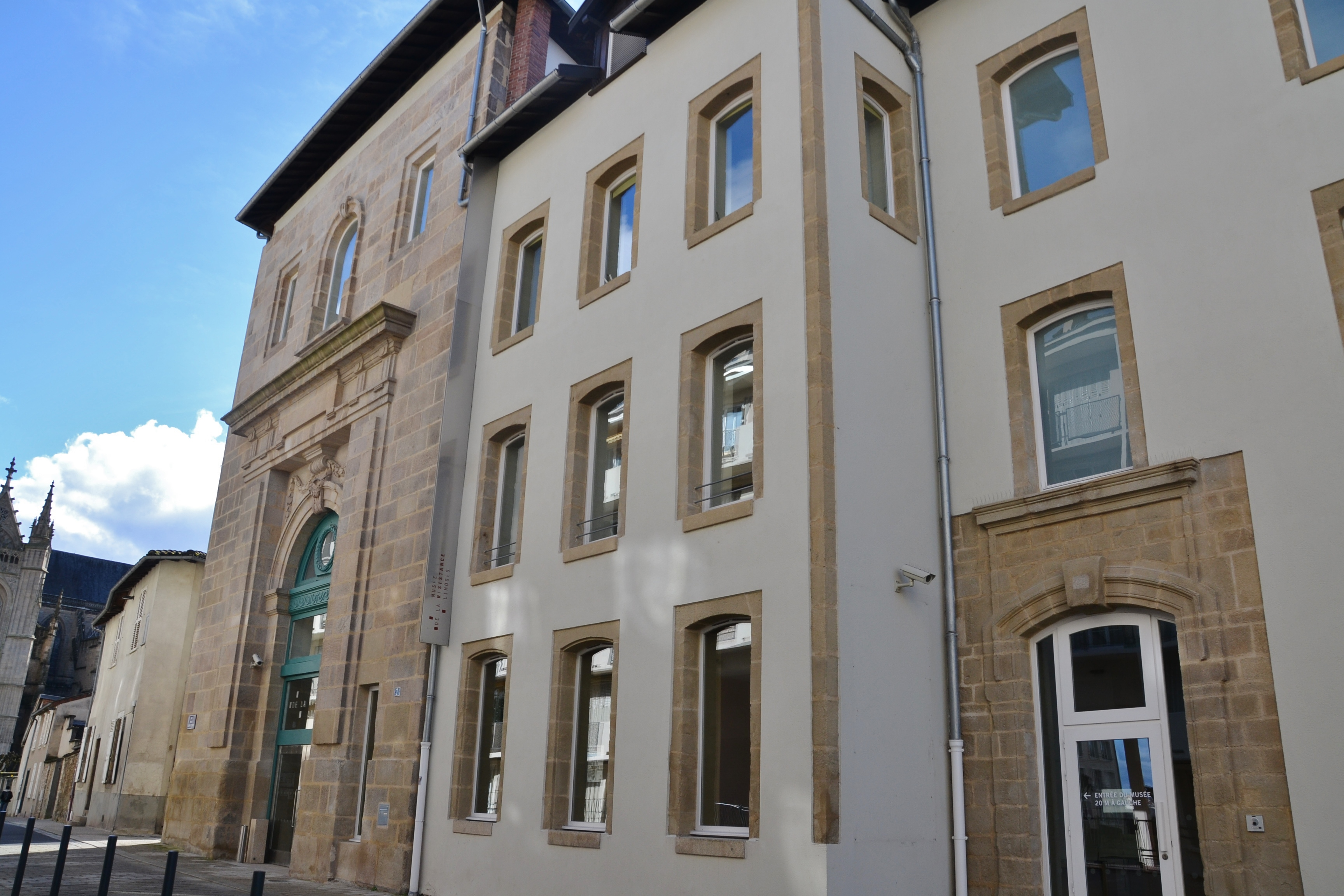 Le musée de la Résistance de Limoges (Haute-Vienne, France)